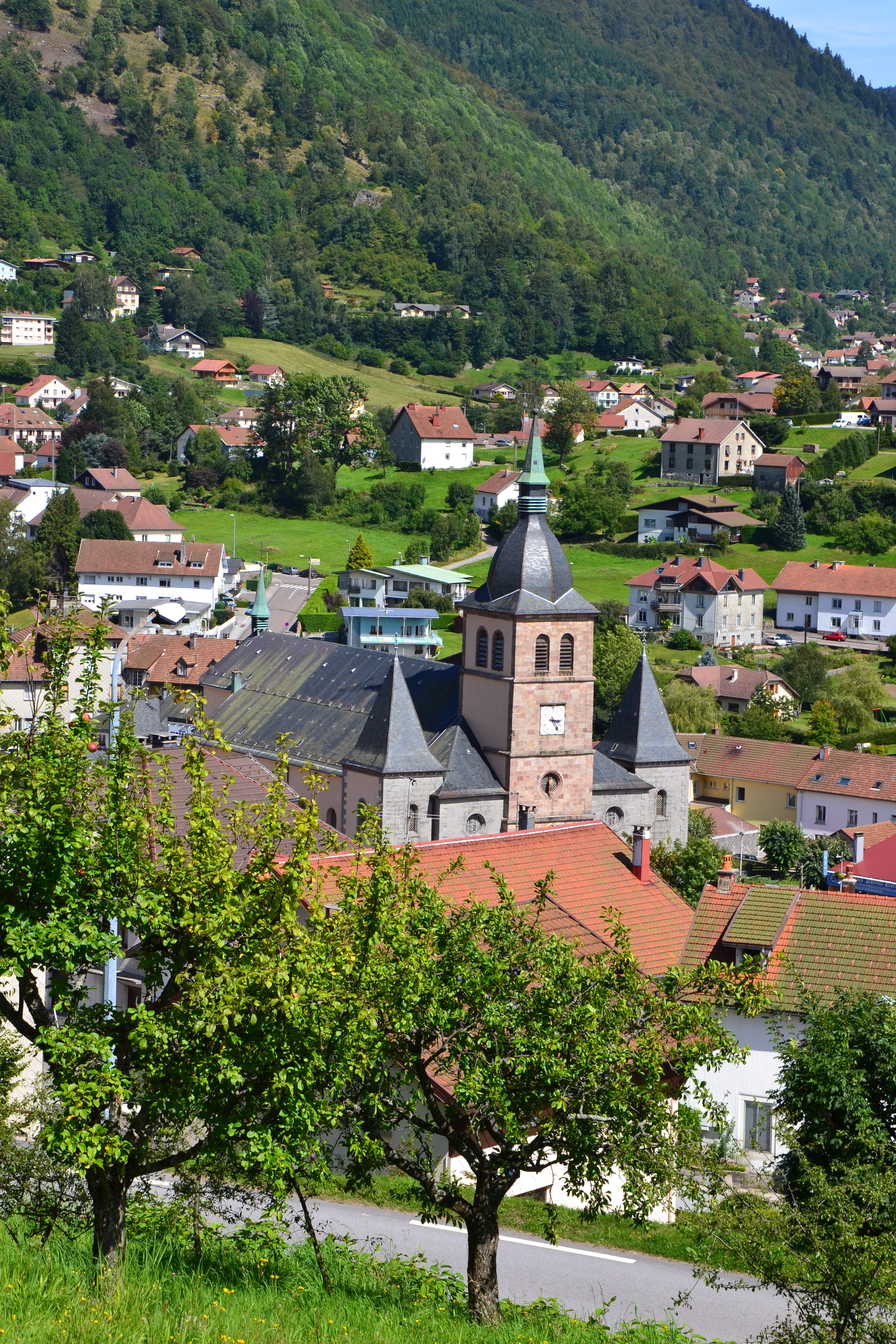 Église de La Bresse, Vosges.